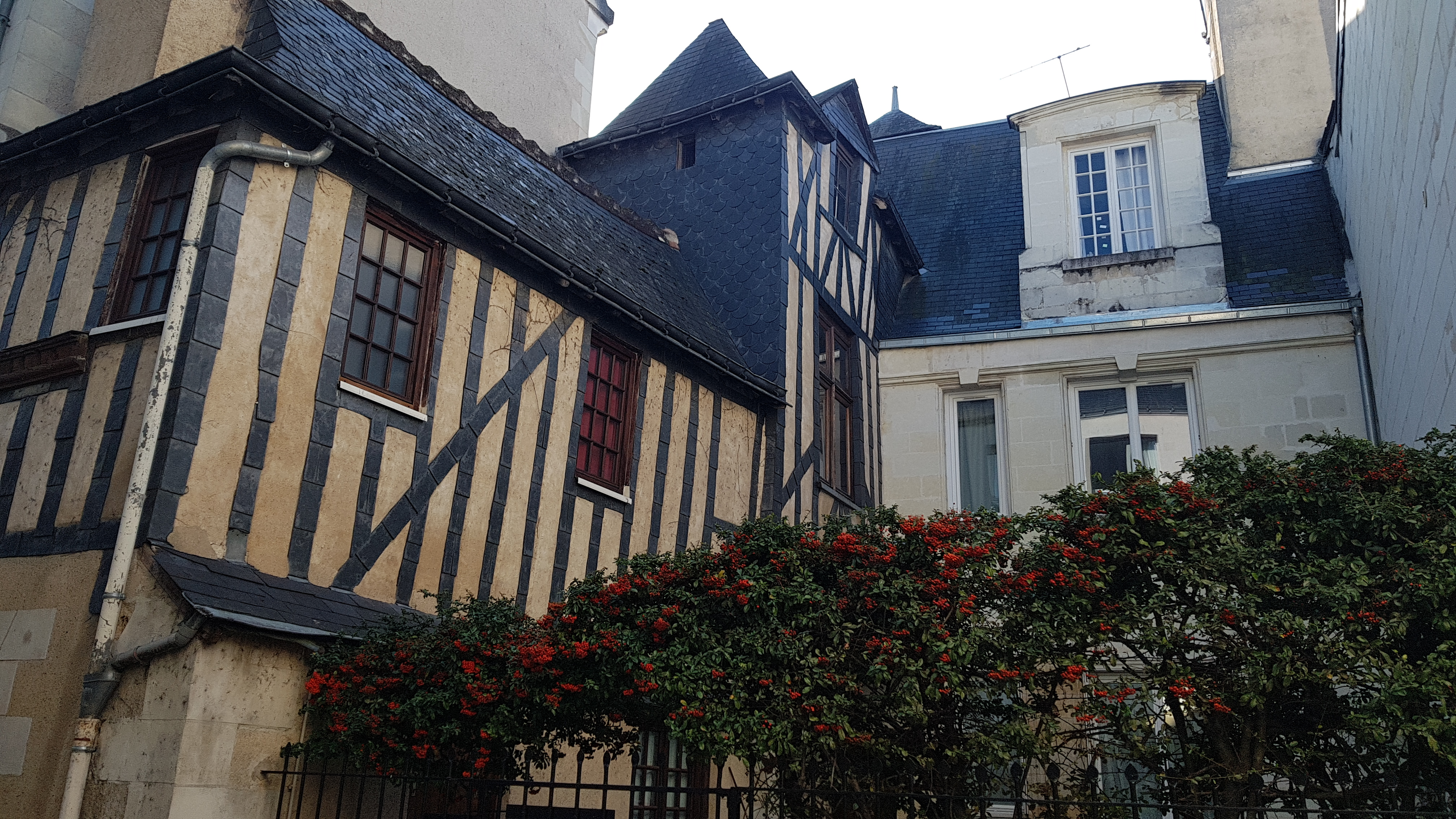 Vieux tours, 8 rue du Murier, hôtel XVIIe siècle